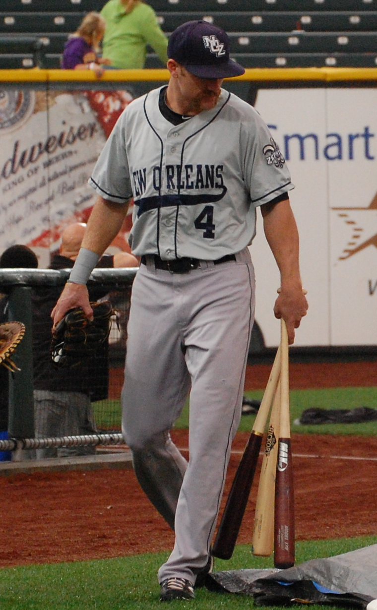 Kevin Mattison